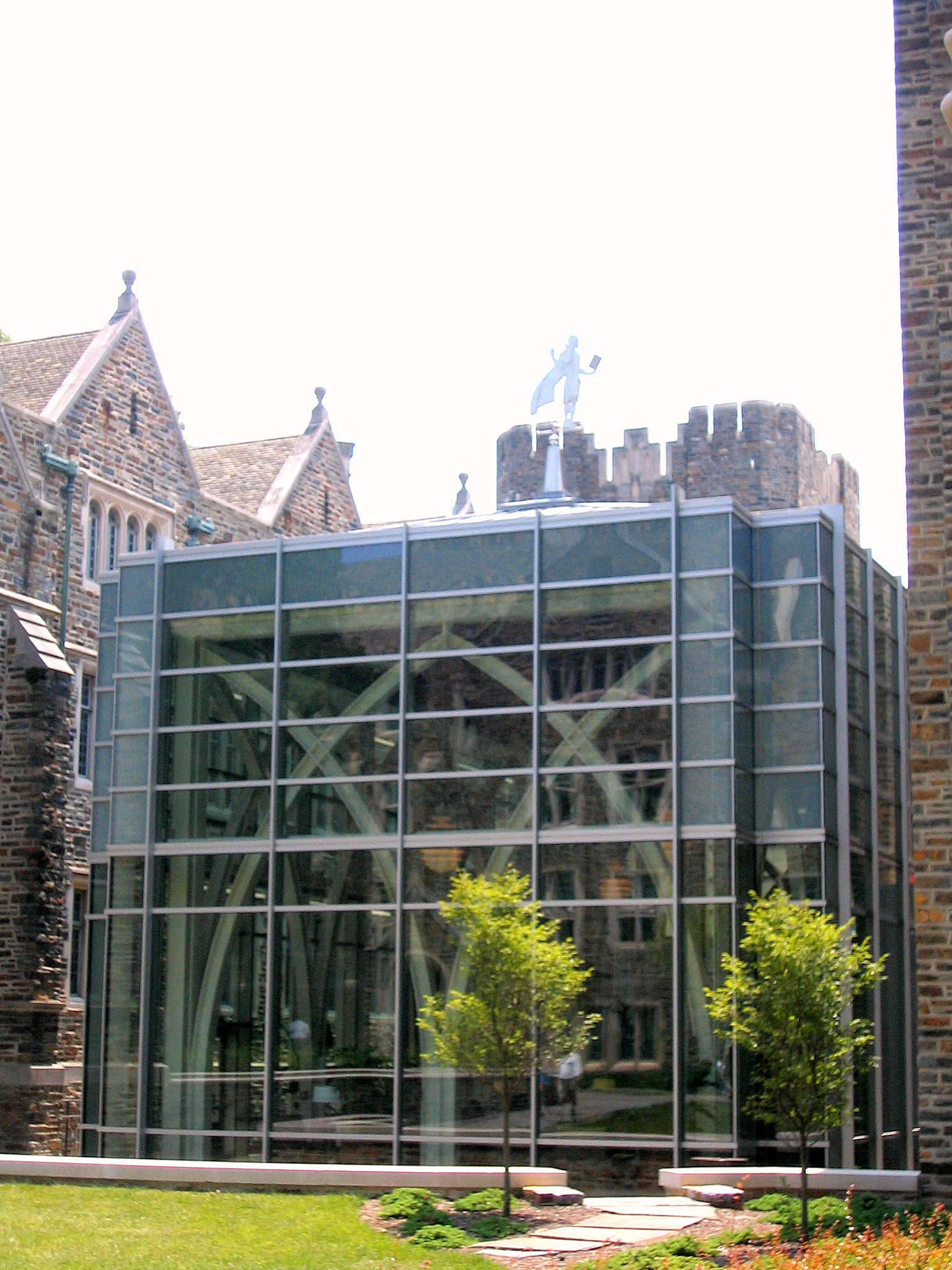 Von der Heyden Pavilion at Duke University